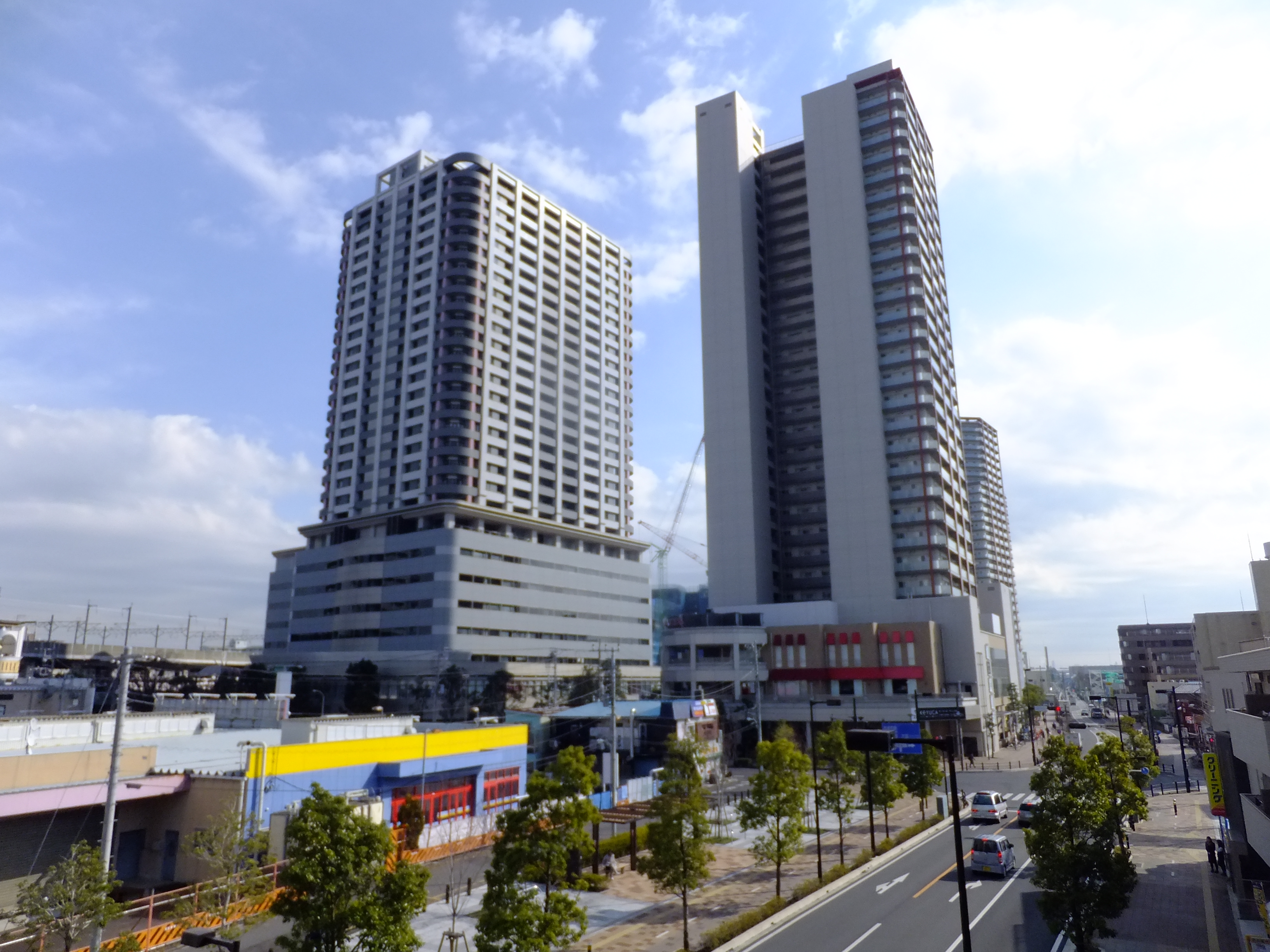 ラムザタワーとプラウドタワー武蔵浦和テラス